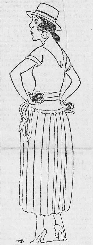 La Argentinita.